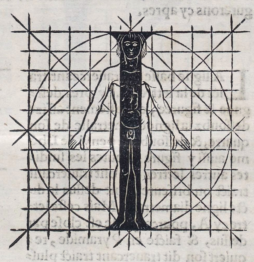 Page from Champ fleury, au quel est contenu lart et science de la deue et vraye proportion des lettres attiques, quon dit autrement lettres antiques et vulgairement lettres romaines, proportionnees selon le corps et visage humain ... par Maistre Geoffroy Tory ...